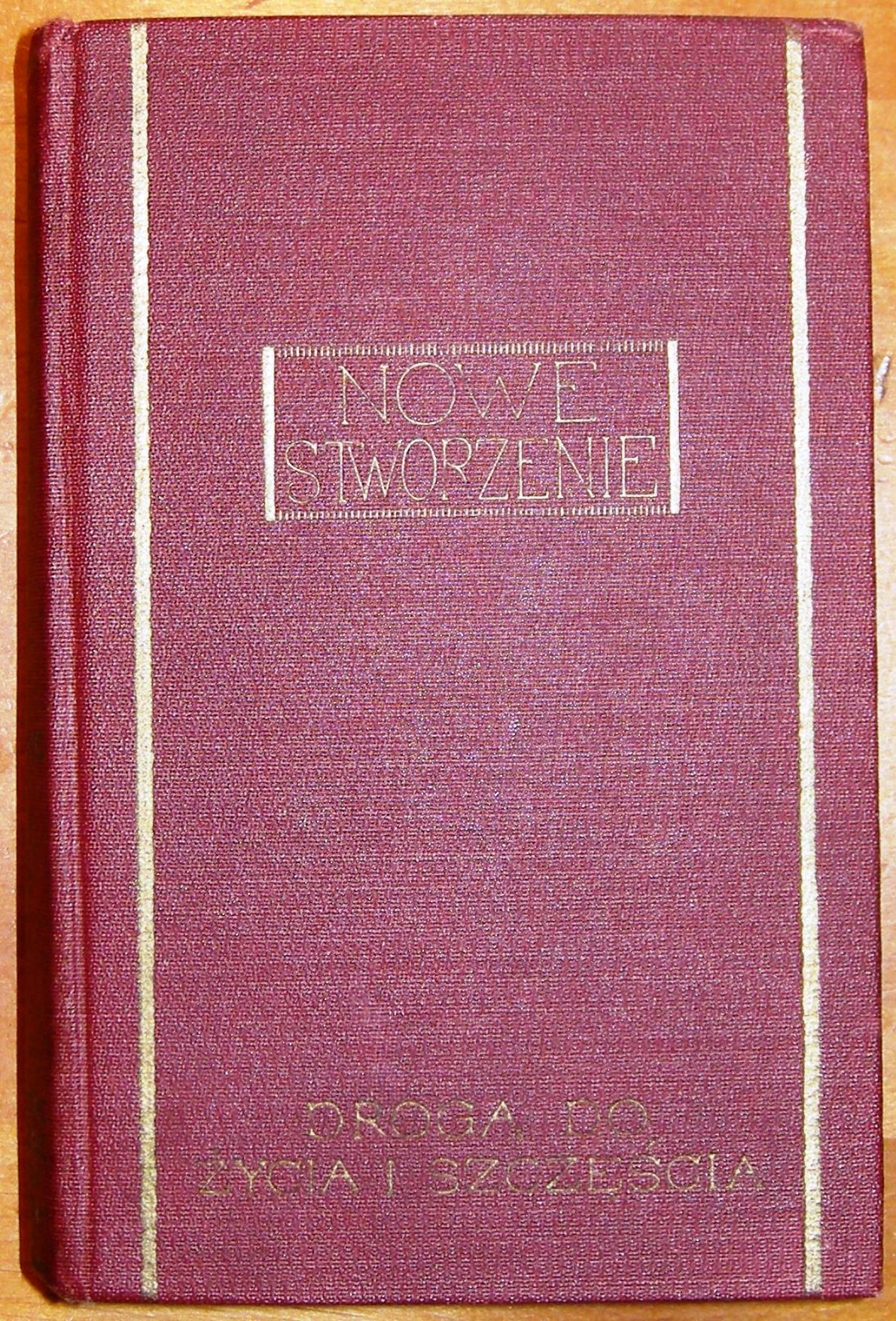 Publikacja wydana w 1904 roku. Nowe stworzenie. VI tom Wykładów Pisma Świętego.